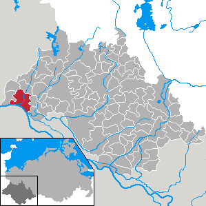 Boizenburg/Elbe in Mecklenburg-Vorpommern - district Ludwigslust